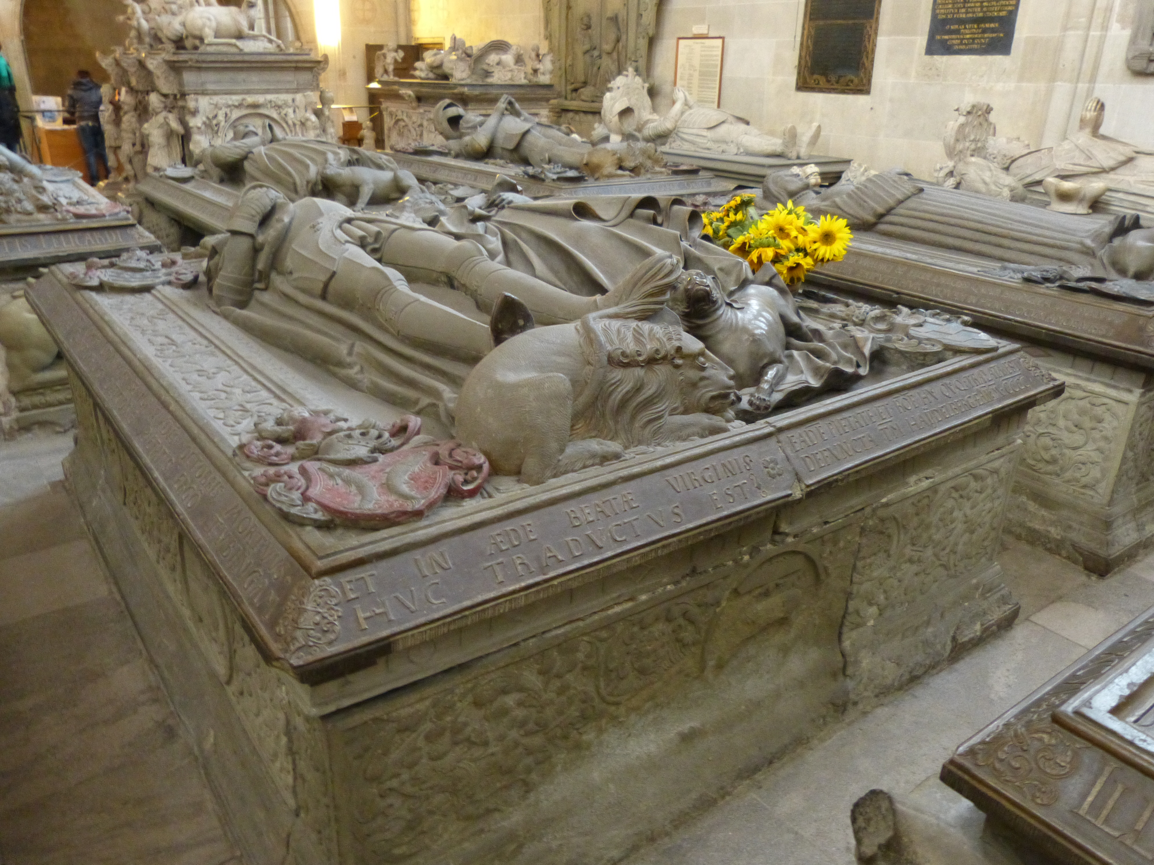 Grablege in der Stiftskirche von Tübingen, Baden-Württembergl